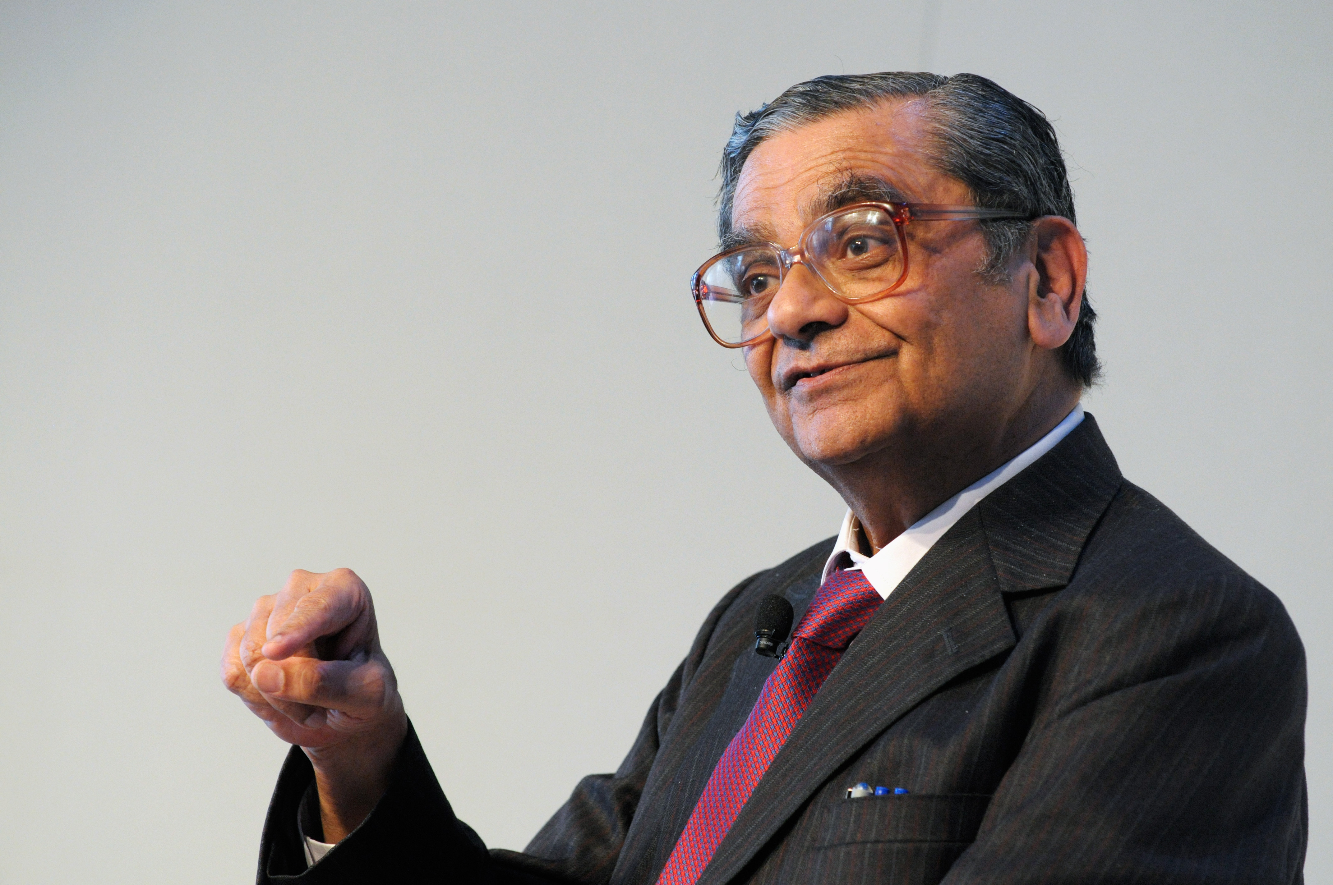 Jagdish N. Bhagwati Professor Jagdish på Columbia University talar vid invigningen av Nordiskt globaliseringsforum i Riksgränsen 2008-04-02